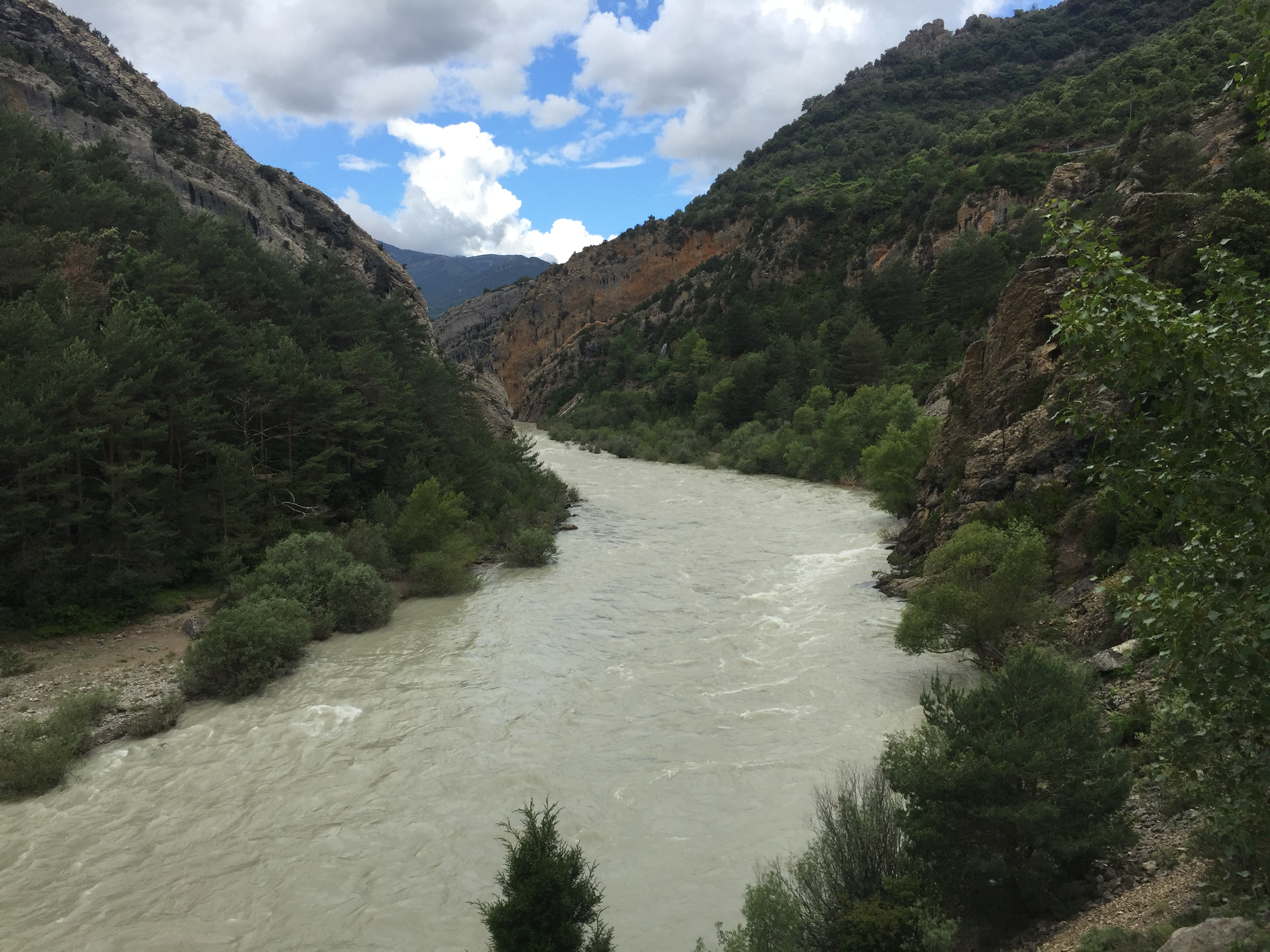 Rio Ara a su paso por la localidad de Janovas. Fiscal (Huesca)